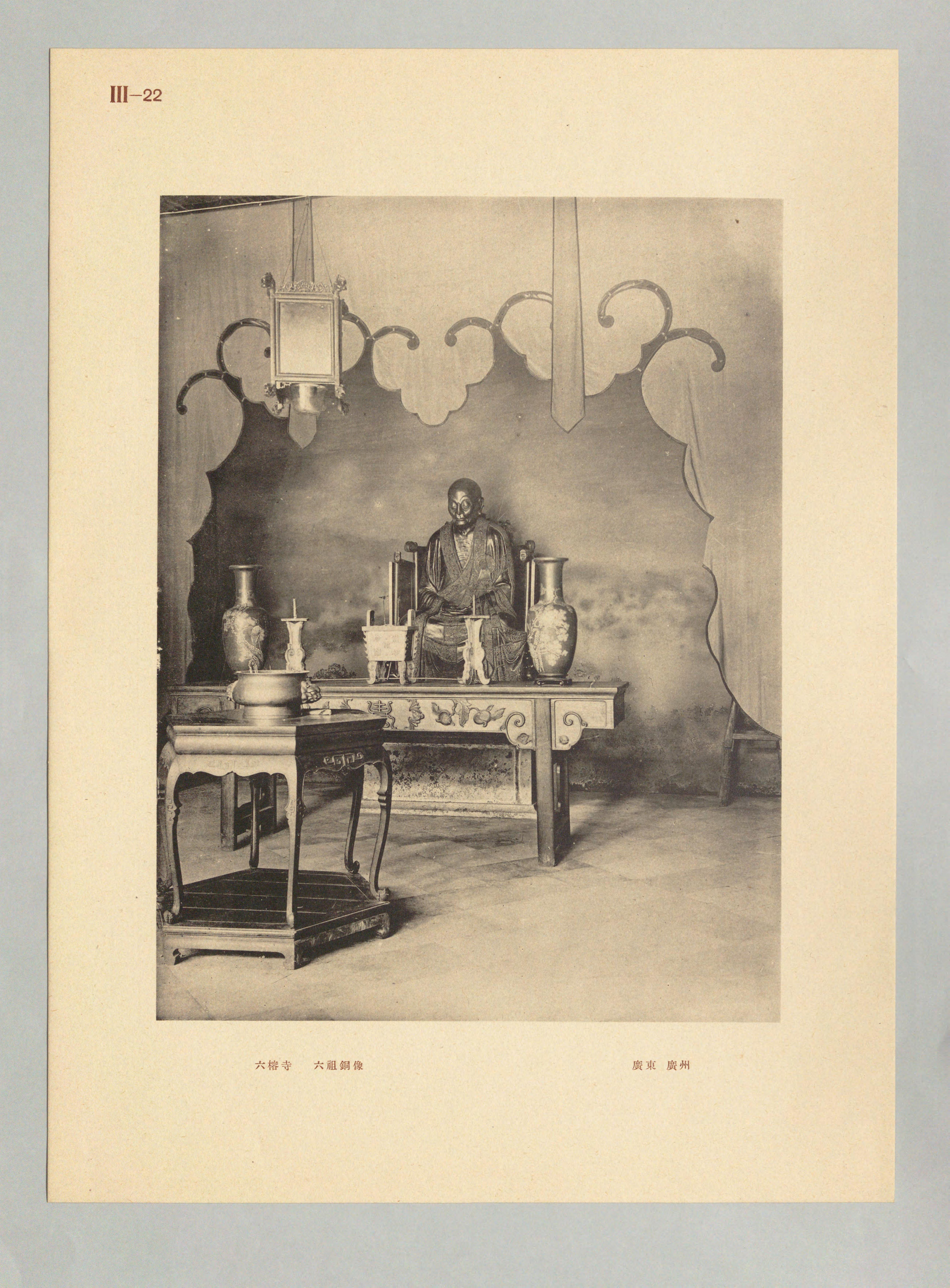 廣州市六榕寺內的六祖銅像